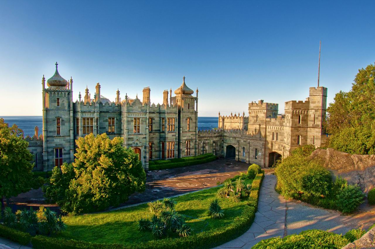 Комплекс споруд Воронцовського палацу